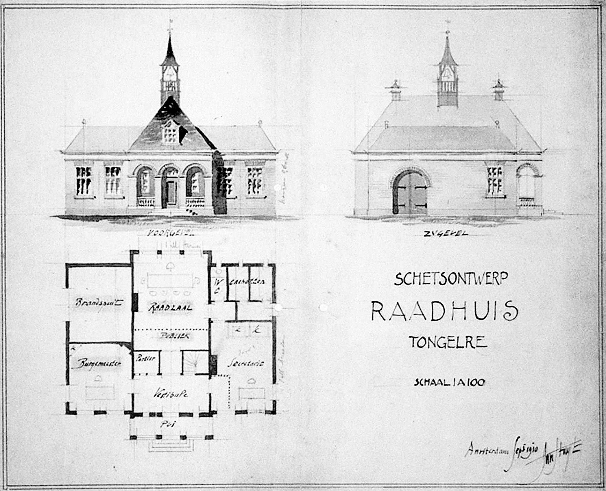 Schetsontwerp van het raadhuis van de voormalige Nederlandse gemeente Tongelre